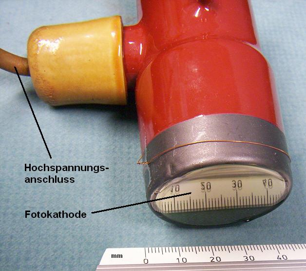 Bildwandlerröhre W-3M (vermutlich Sowjetunion, Bj. 1976) andere Versionen: Bildw2